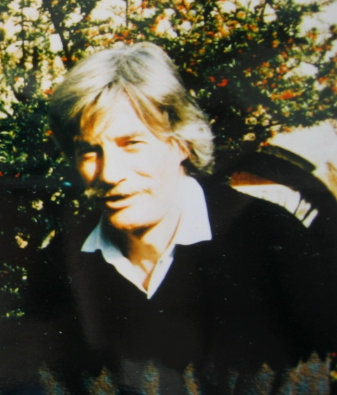 Jean Ferrat, chanteur Français décédé en mars 2010.